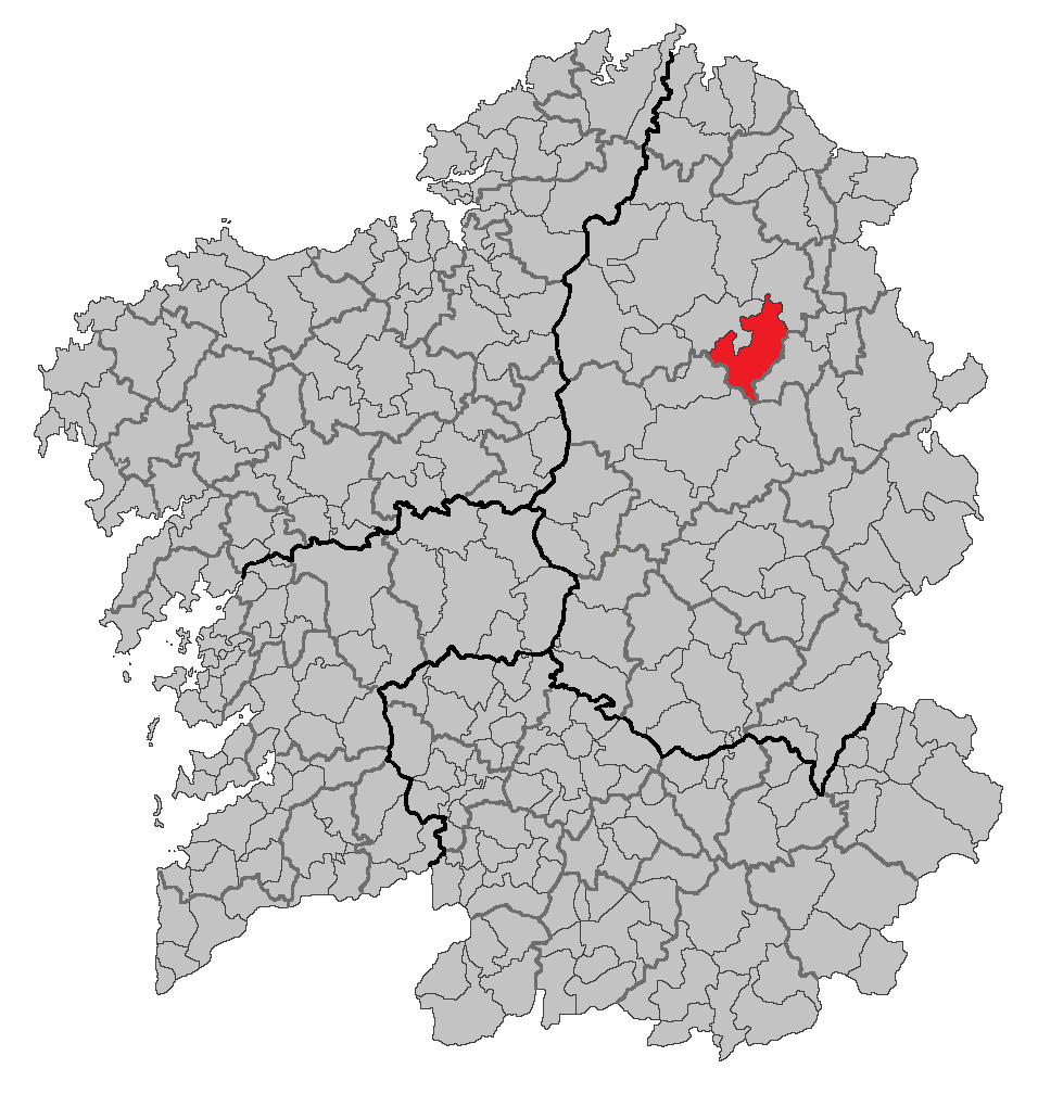 Mapa coa localización do concello de Castro de Rei.